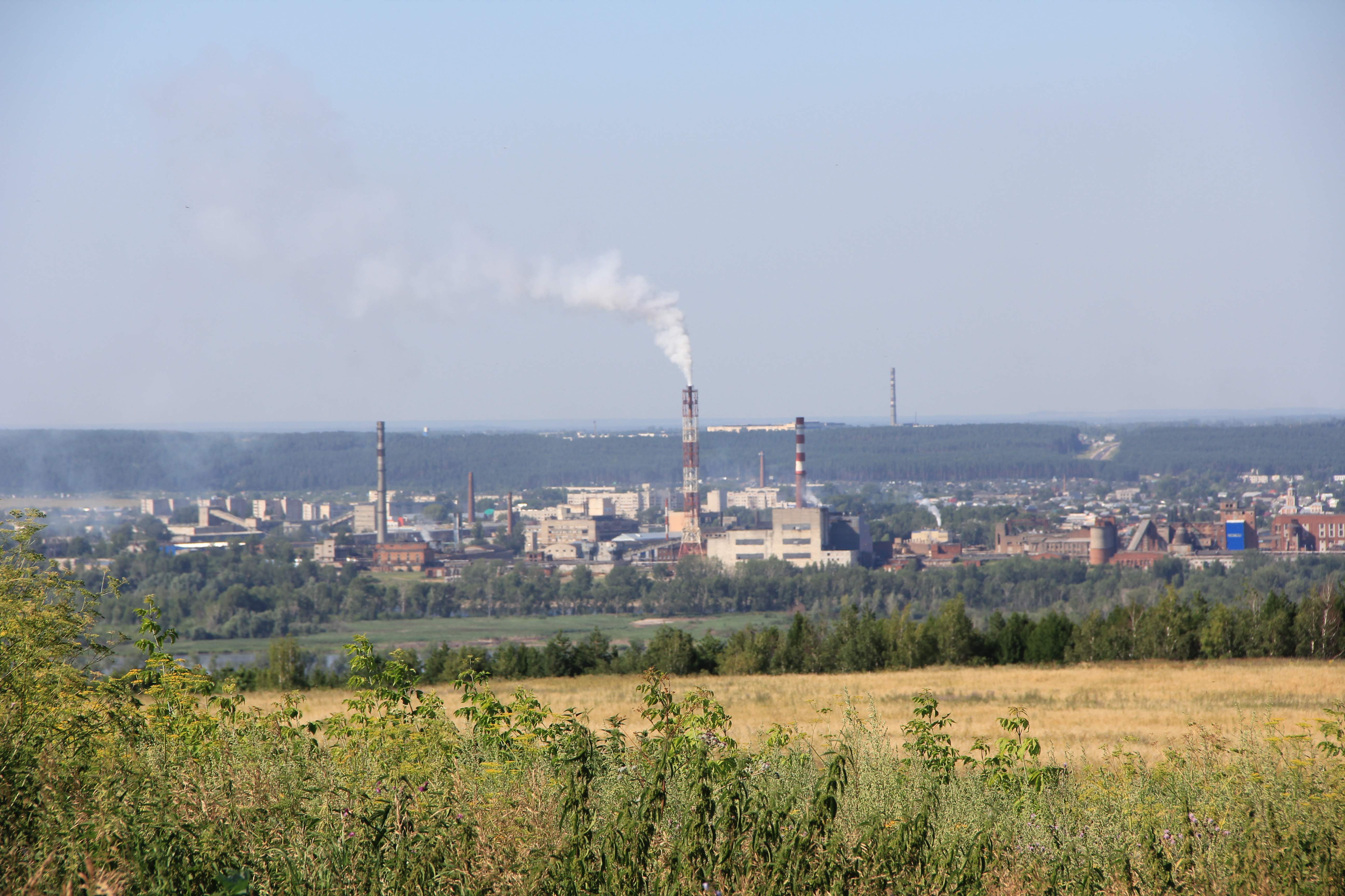 г.Волжск, Республика Марий Эл.